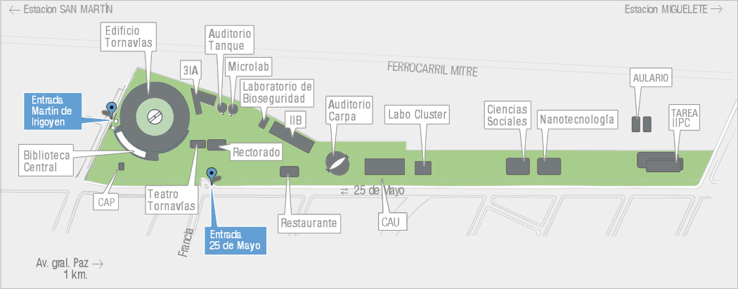 Mapa del Campus UNSAM a inicios de 2018